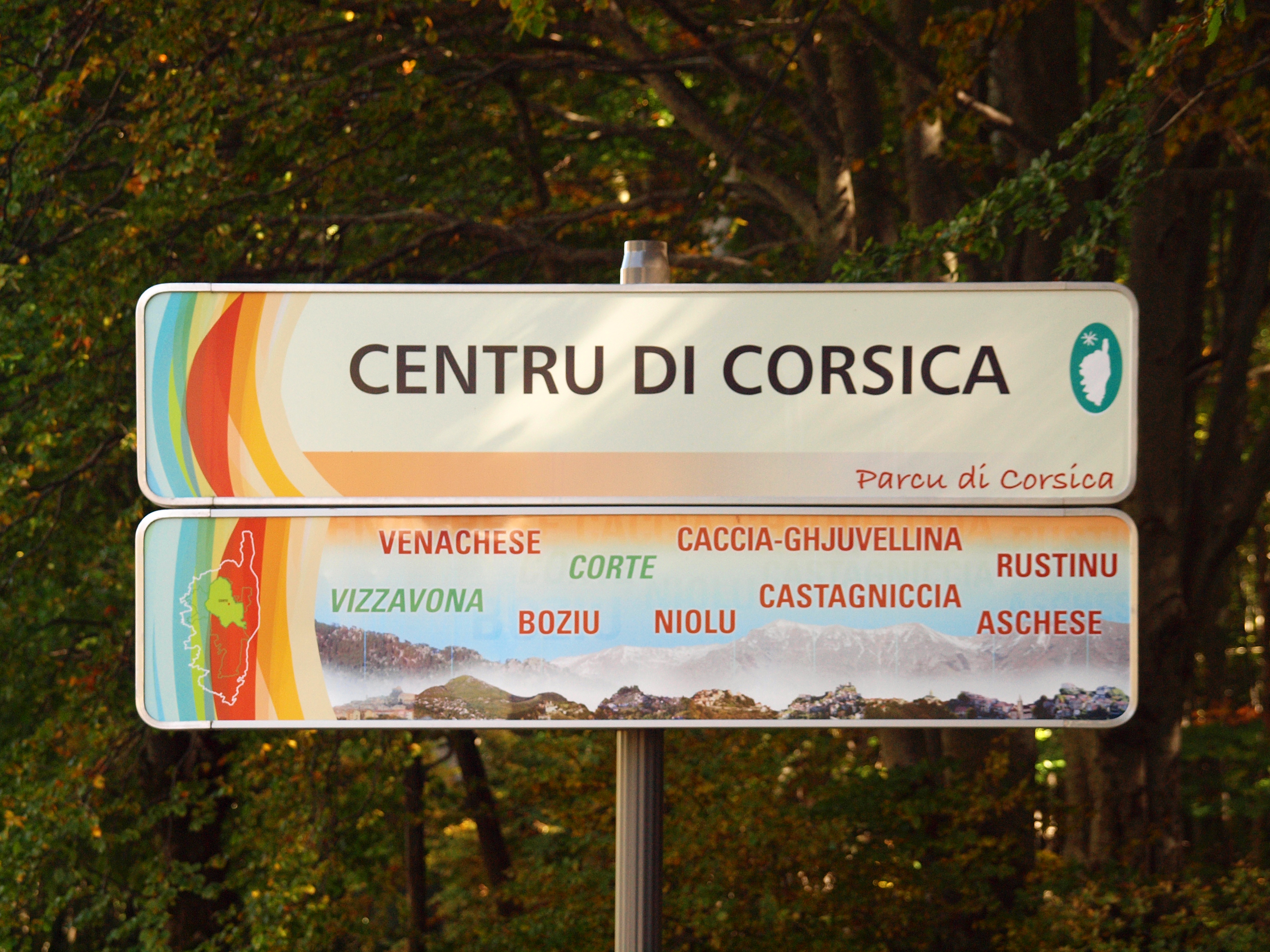 Vivario (Corsica) - Panneau d'entrée dans Cenru di Corsica au col de Vizzavona